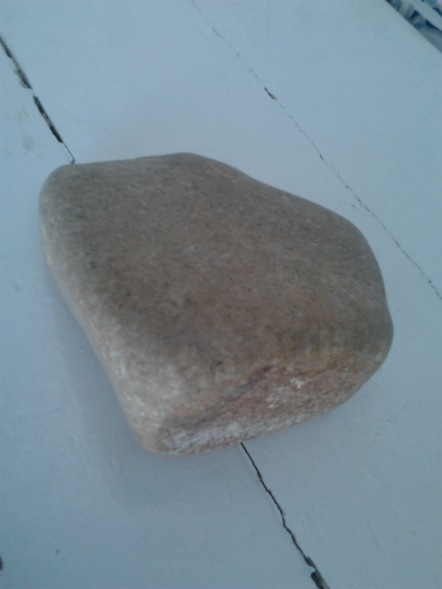 Mosquée "Ennour" (Lumière) - Résidence 6 - Monastir (Pierre de l'ablution à sec)